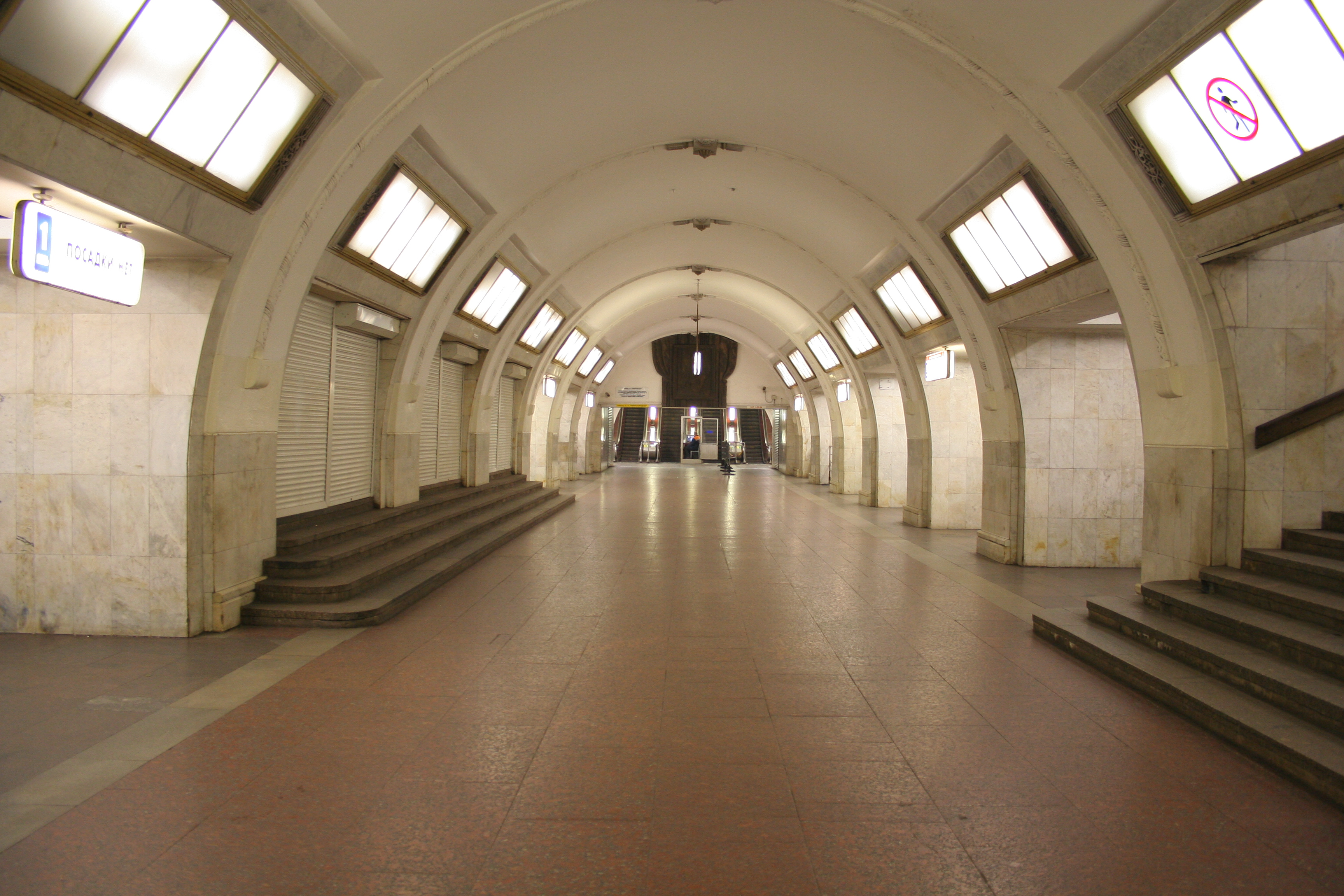 U-Bahnhof Tretjakowskaja (nördlicher Bahnsteig) der Metro Moskau.